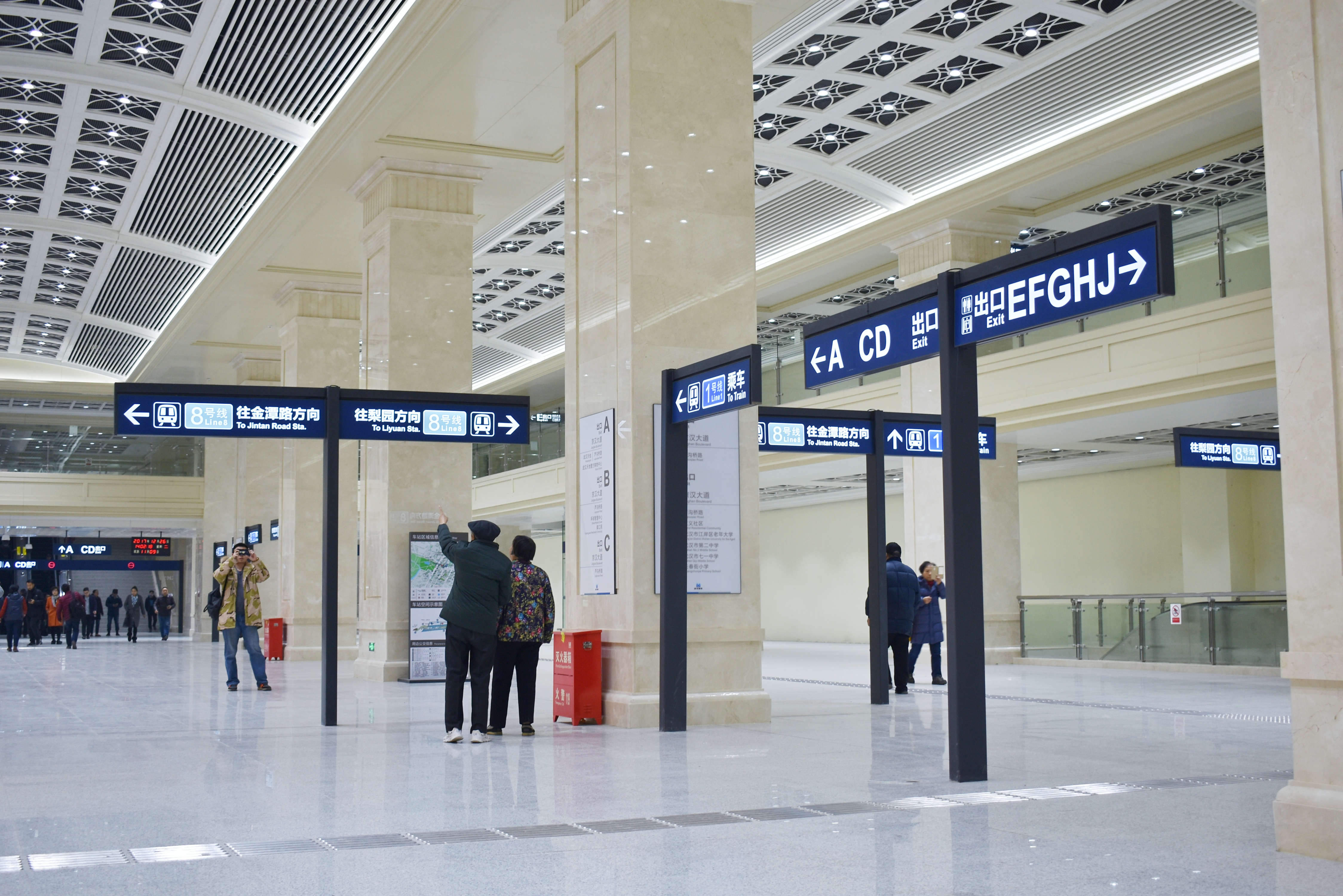 Station Hall of Line 8